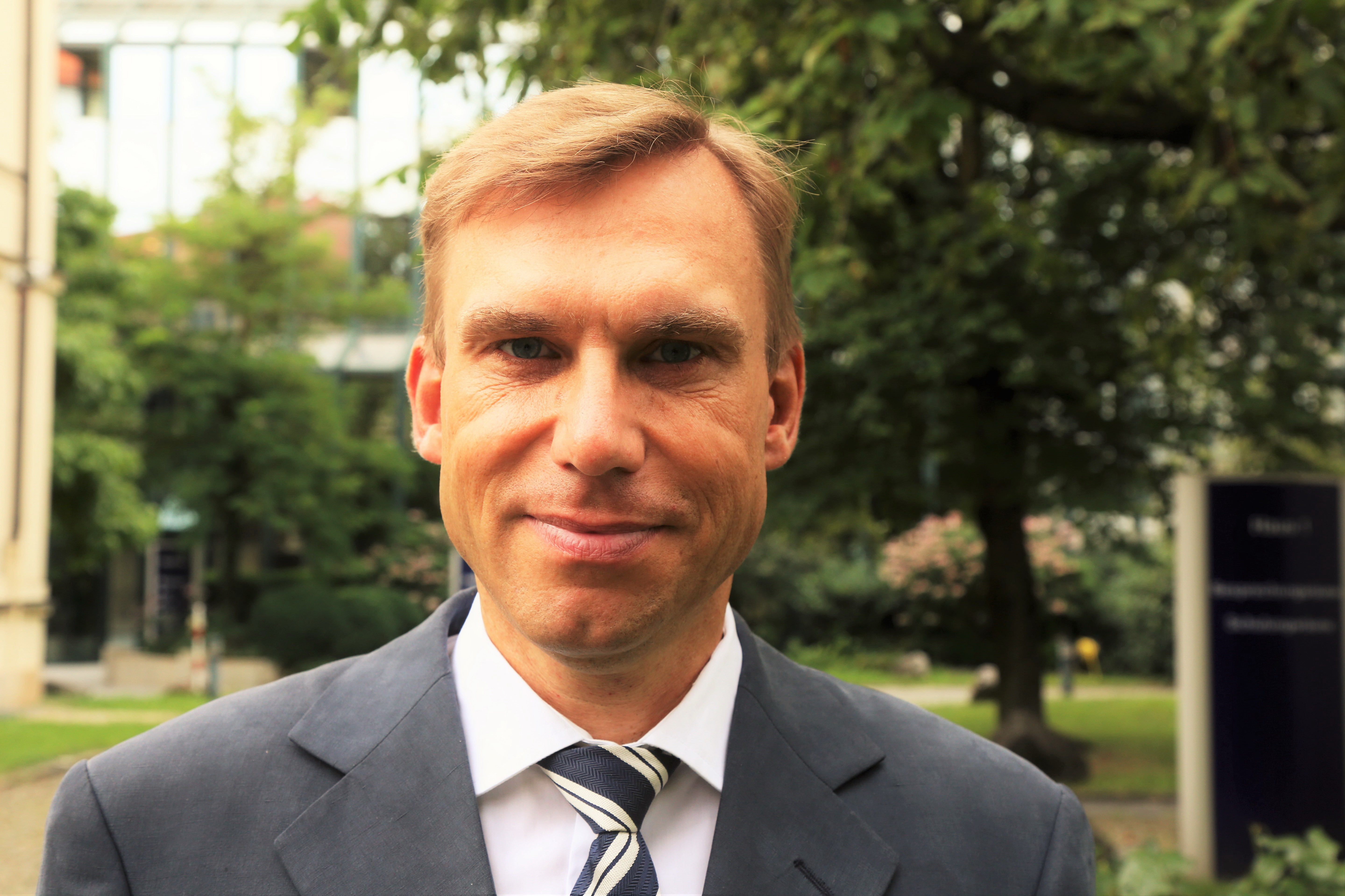 Prof. Dr. Dr. h.c. Martin Thurner